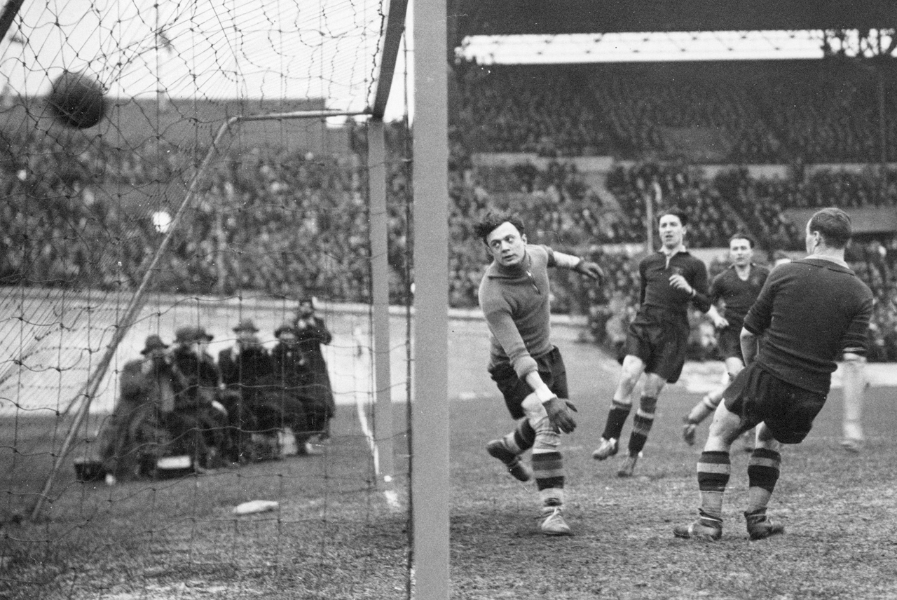 De Belgische doelman Vandeweijer is wederom geslagen. Nederland - België (9-3), gespeeld op 11 maart 1934 in het Olympisch Stadion te Amsterdam.